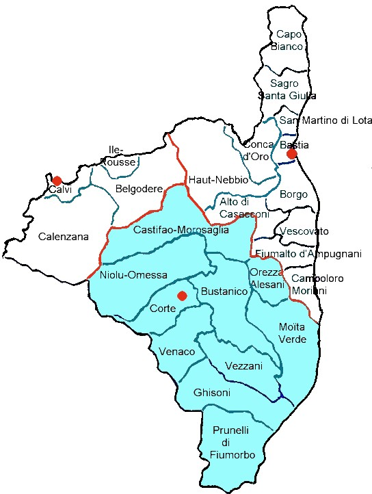 Arrondissement de Corte, Haute-Corse. Division administrative, finage de l'arrondissement, cantons électoraux. Corsu: U circondu è a ghjura curtinese, cu i cantoni novi